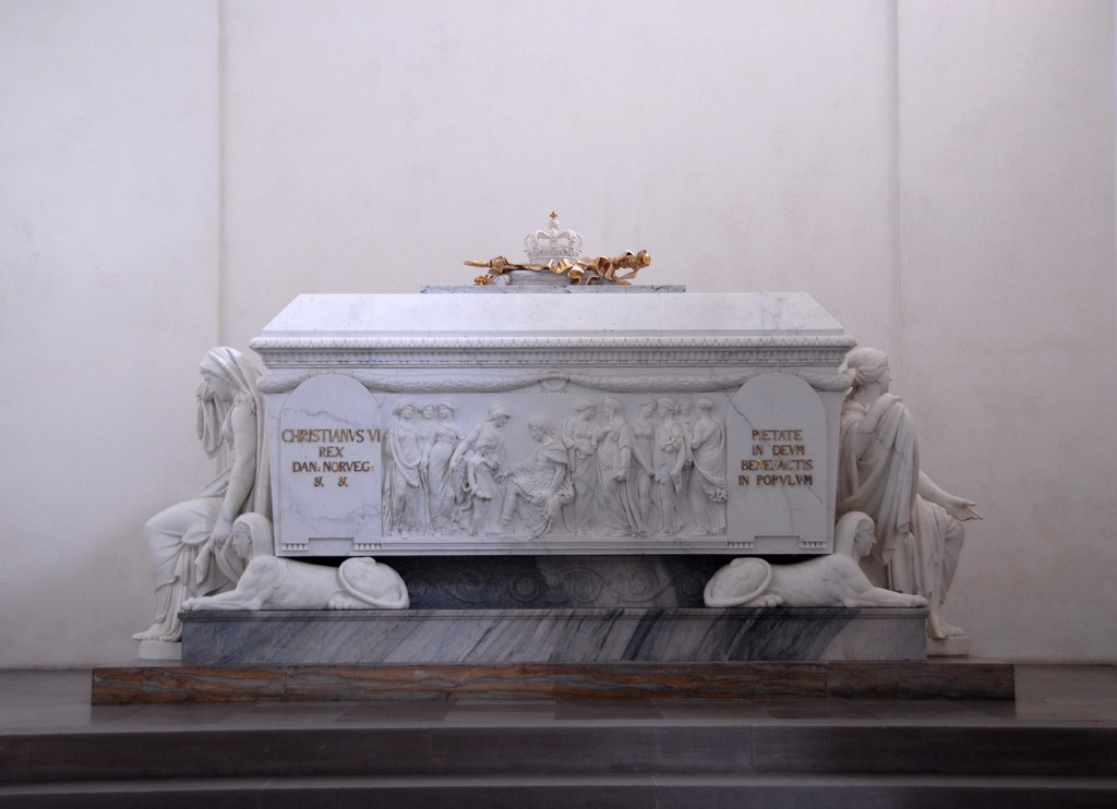 Christian VI (1699-1746) was king of Denmark and Norway from 1730 till his death in 1746. Christiaan VI (1699-1746) was koning van Denemarken en Noorwegen van 1730 tot 1746.